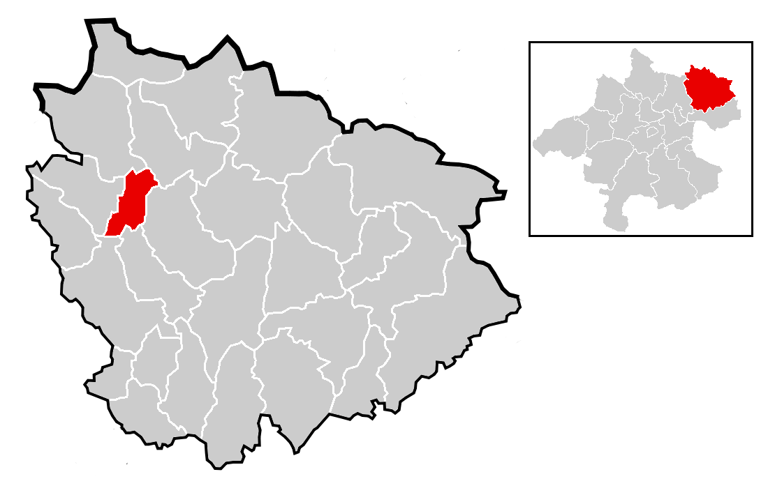 Lage der Stadtgemeinde Freistadt im Bezirk und OÖ